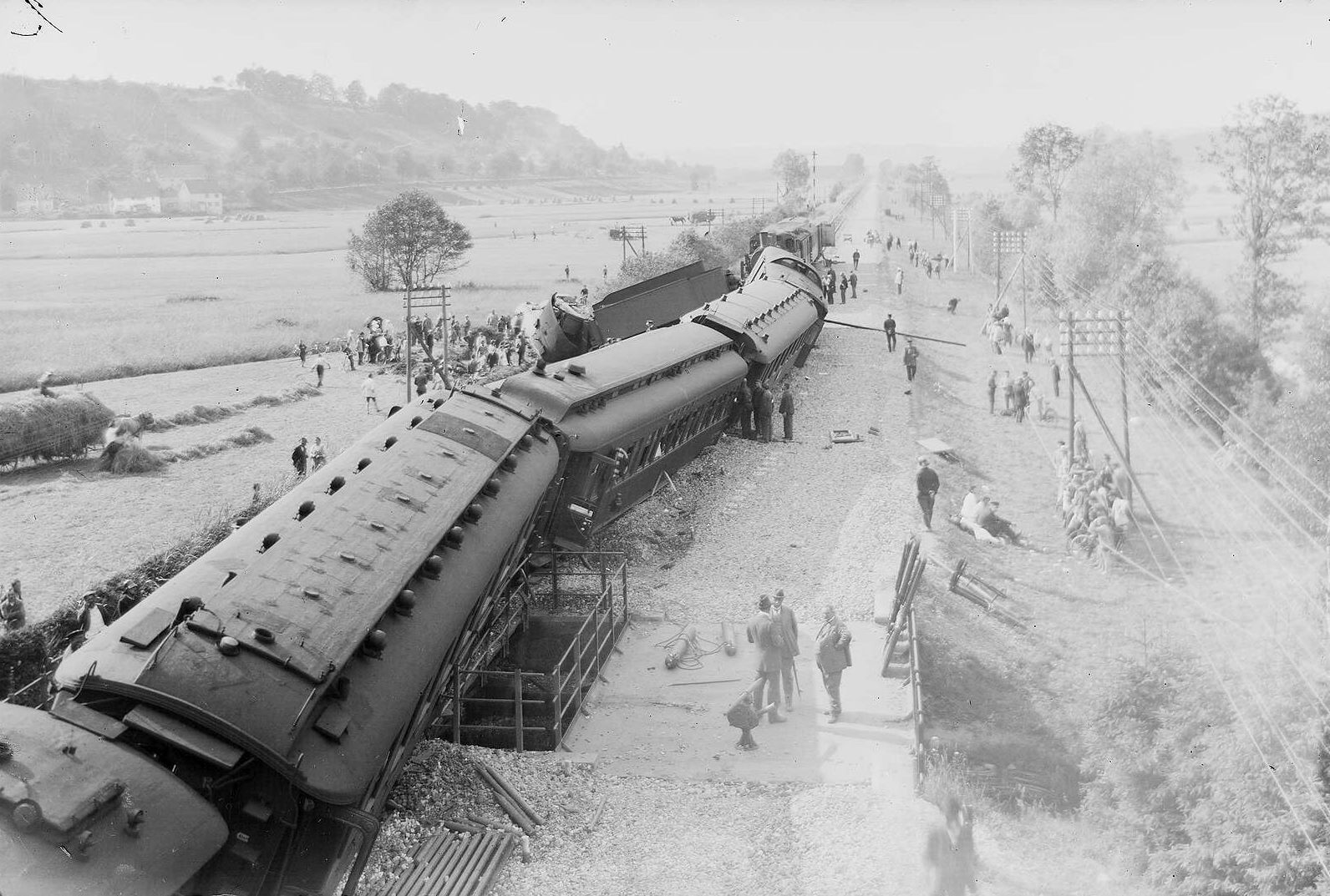 Zugunglück bei Ummendorf, Landesarchiv Baden-Württemberg, Findbuch N 1-68 Nr. 1599